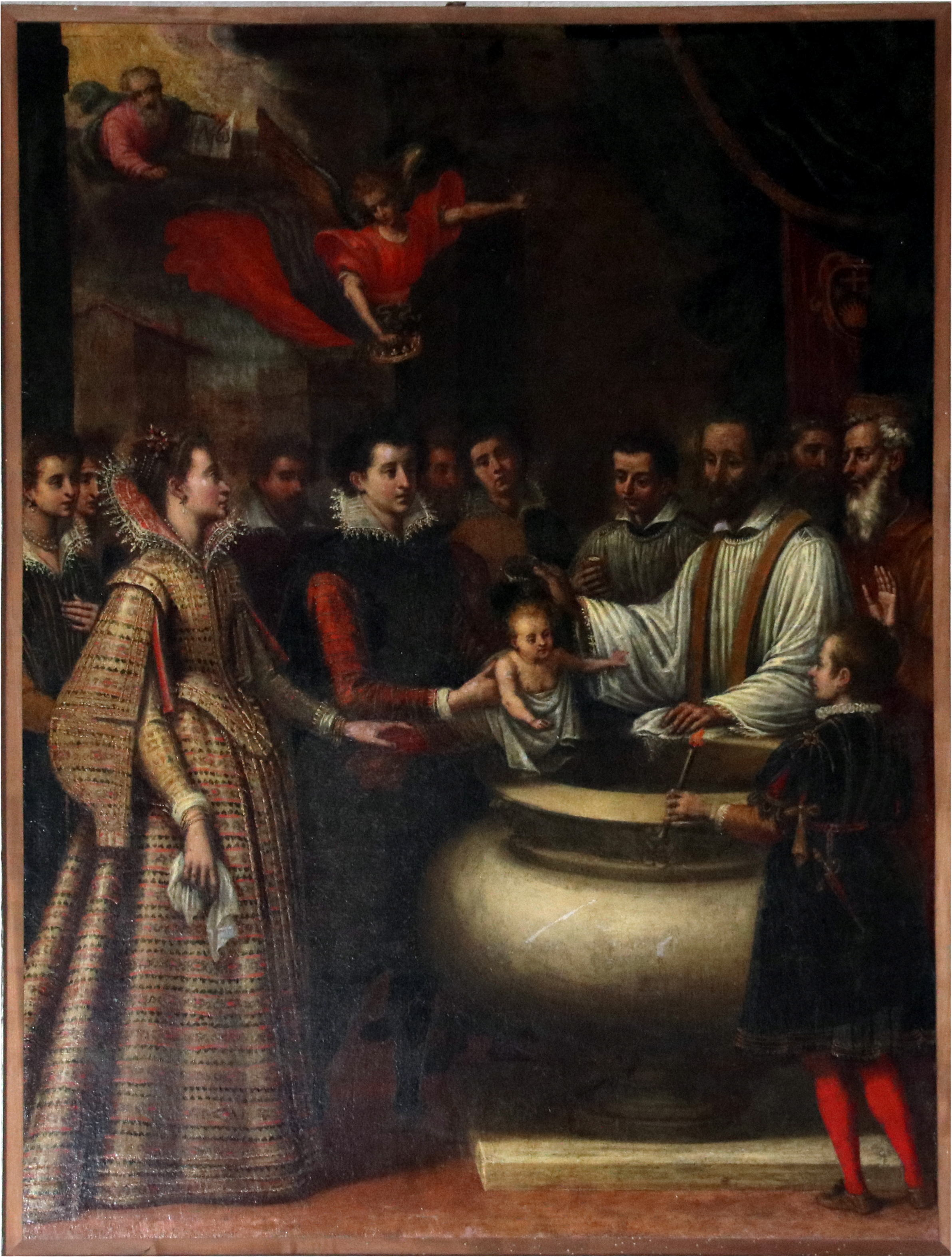 Simone Sacchettini, L’angelo custode che presiede a un battesimo, 1611, Pieve di Sant'Agata (Sant'Agata del Mugello)